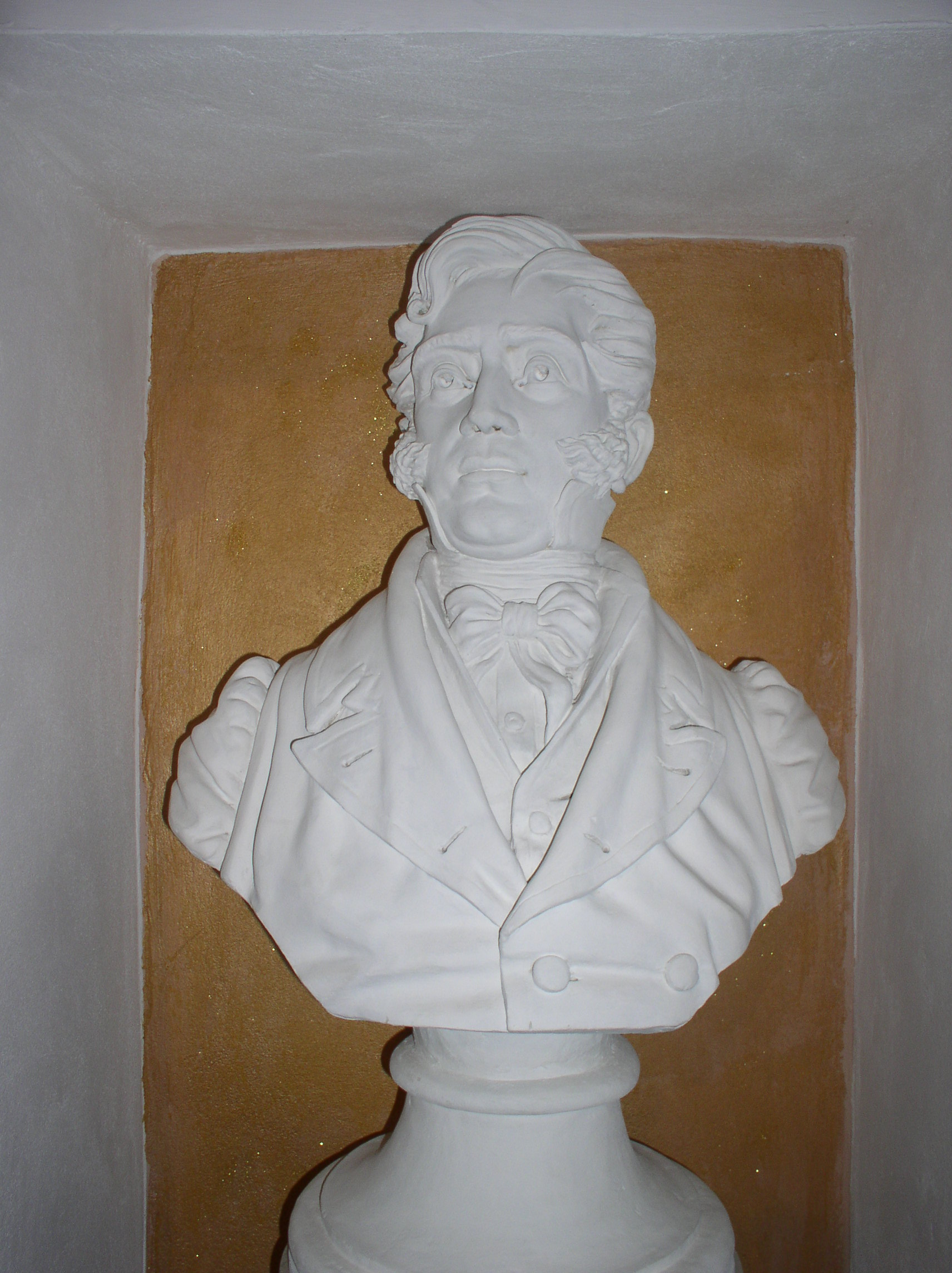 Büste von Olivio Sozzi. Sicilianu: Lu bustu di Oliviu Sozzi chi s'attrova â trasuta dâ chiesa di Santa Maria a Spaccafurnu.